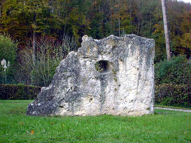 Heidenstein - Niederschwörstadt - Baden-Württemberg - Deutschland